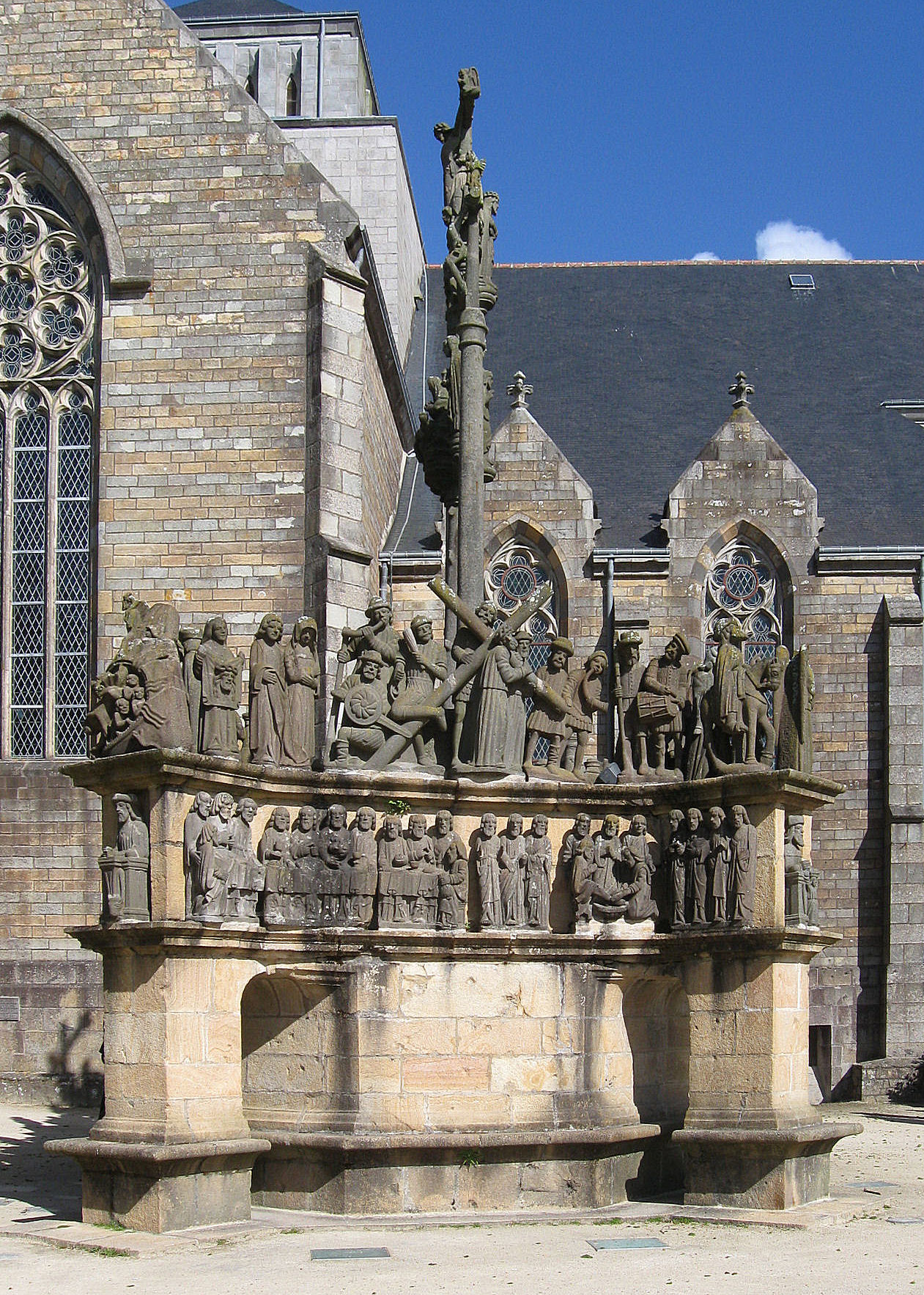 Plougastel-Daoulas, Finistere, Bretagne